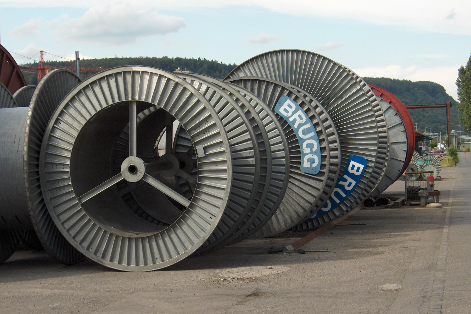 Brugg: Von der Kabelwerke Brugg AG hergestellte Kabelrollen Fotografiert durch Voyager, 28. Juni 2006 Brugg: Cable drums manufactured by Kabelwerke Brugg AG Photo taken by Voyager, 28 June 2006